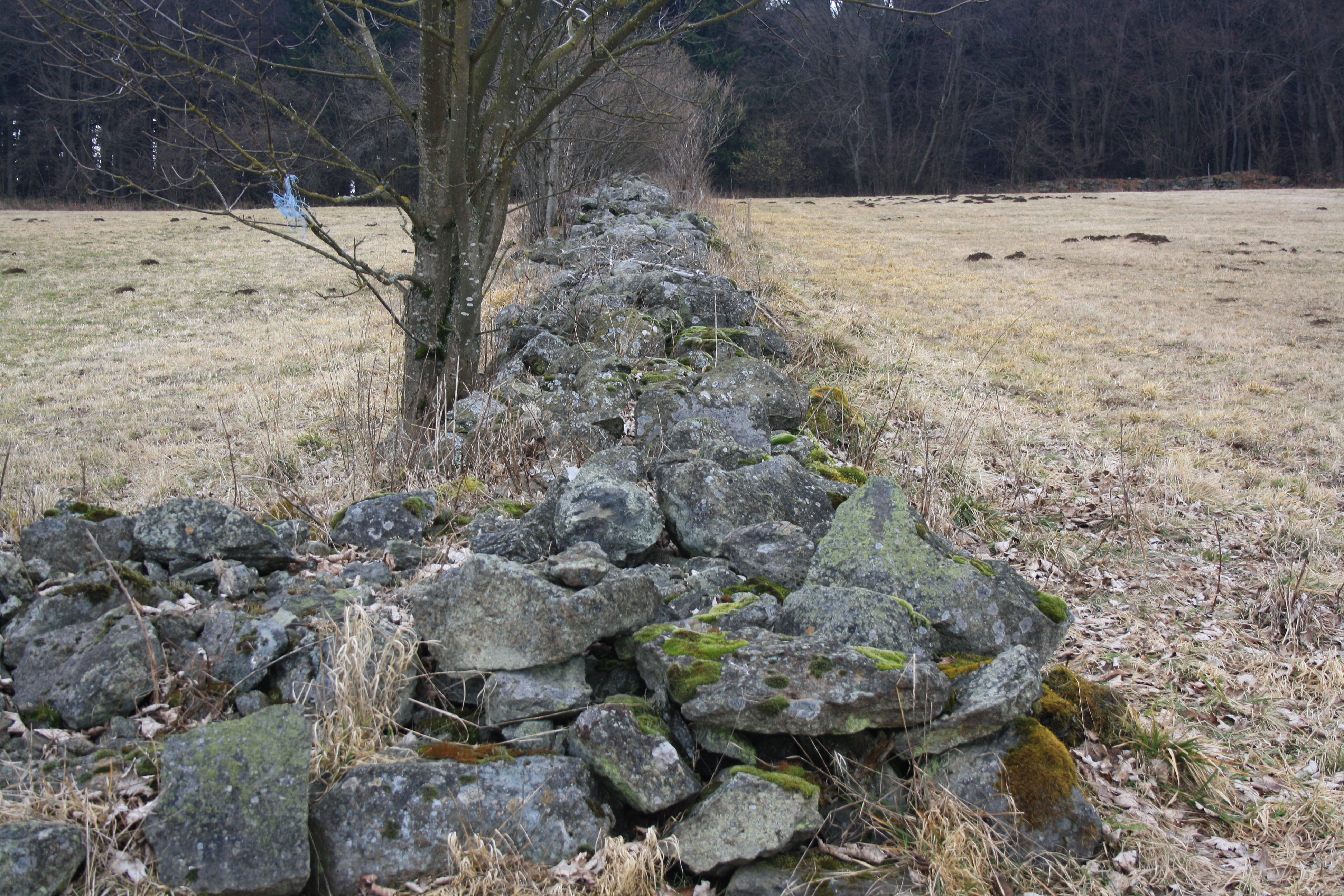 Rhönhof, Feldsteinwall (Dr.-Hellmuth-Plan)